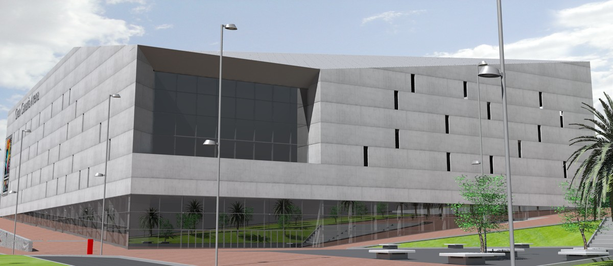 Infografia de fachada exterior